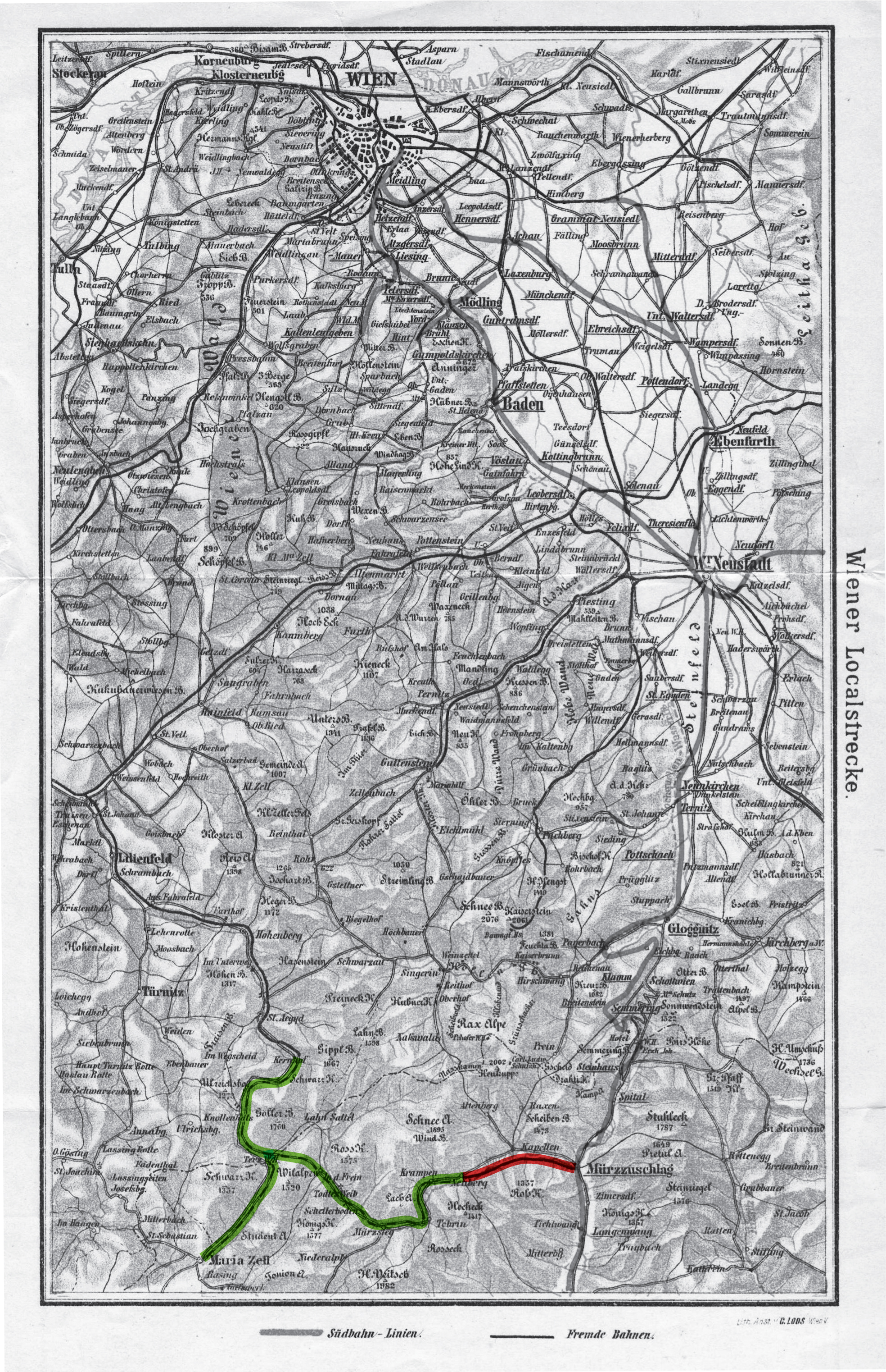 Österreich, Steiermark, Lokalbahn Mürzzuschlag–Neuberg, geplante, nicht verwirklichte Erweiterung